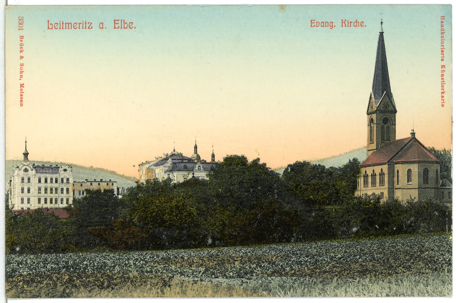 Leitmeritz; Evangelische Kirche This postcard is from publisher Brück & Sohn in Meißen ( postcard has a unique number 03301 and is available in a higher resolution at the publisher. This images was uploaded in a cooperation project between Wikipedians and the publisher.